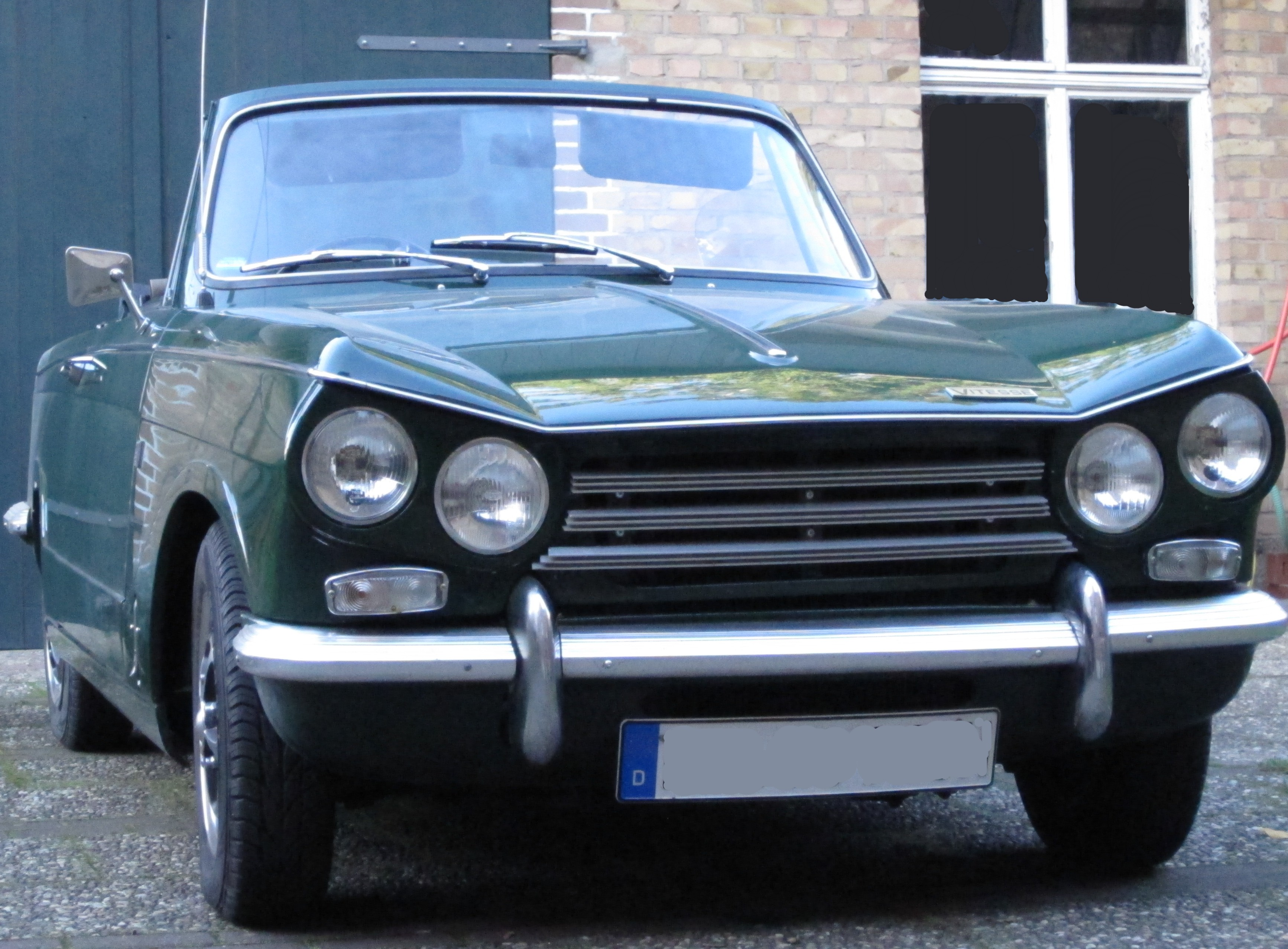 Triumph Vitesse MKII convertible. overdrive, conifer green, Bj. November 1968